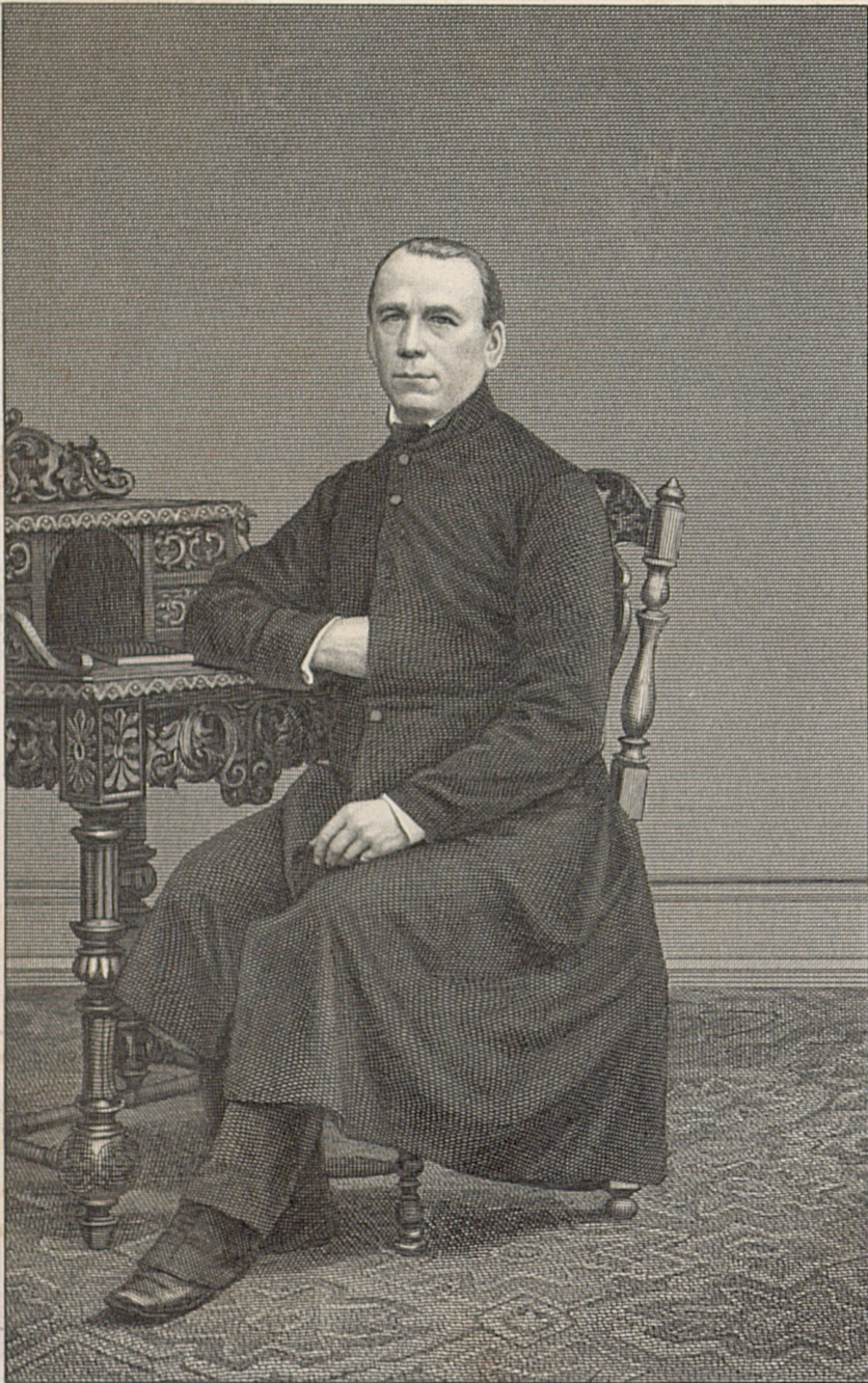 Adolph Kolping – Stahlstich nach einer Photographie.